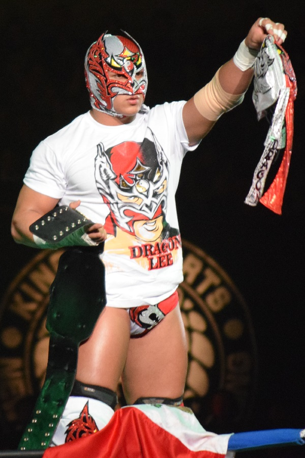 2017年2月11日 大阪府立体育会館 「THE NEW BEGINNING in OSAKA」 ドラゴン・リー (2代目)